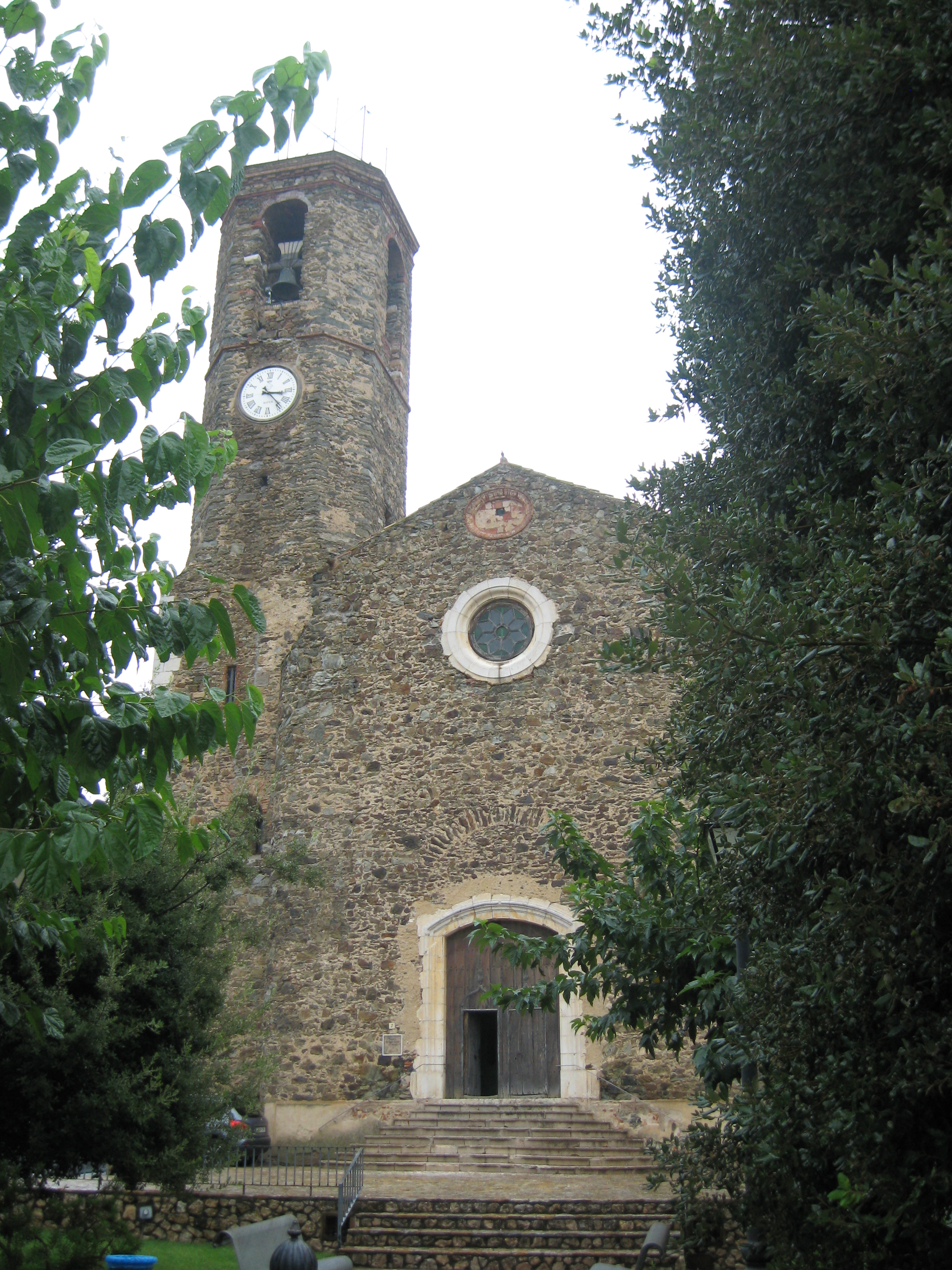 Romanische Kirche in Garriguella Datum: 21.09.2010 Urheber: Michael Pfeiffer alias Benutzer:Gordito1869 Quelle: privates Fotoarchiv des Urhebers